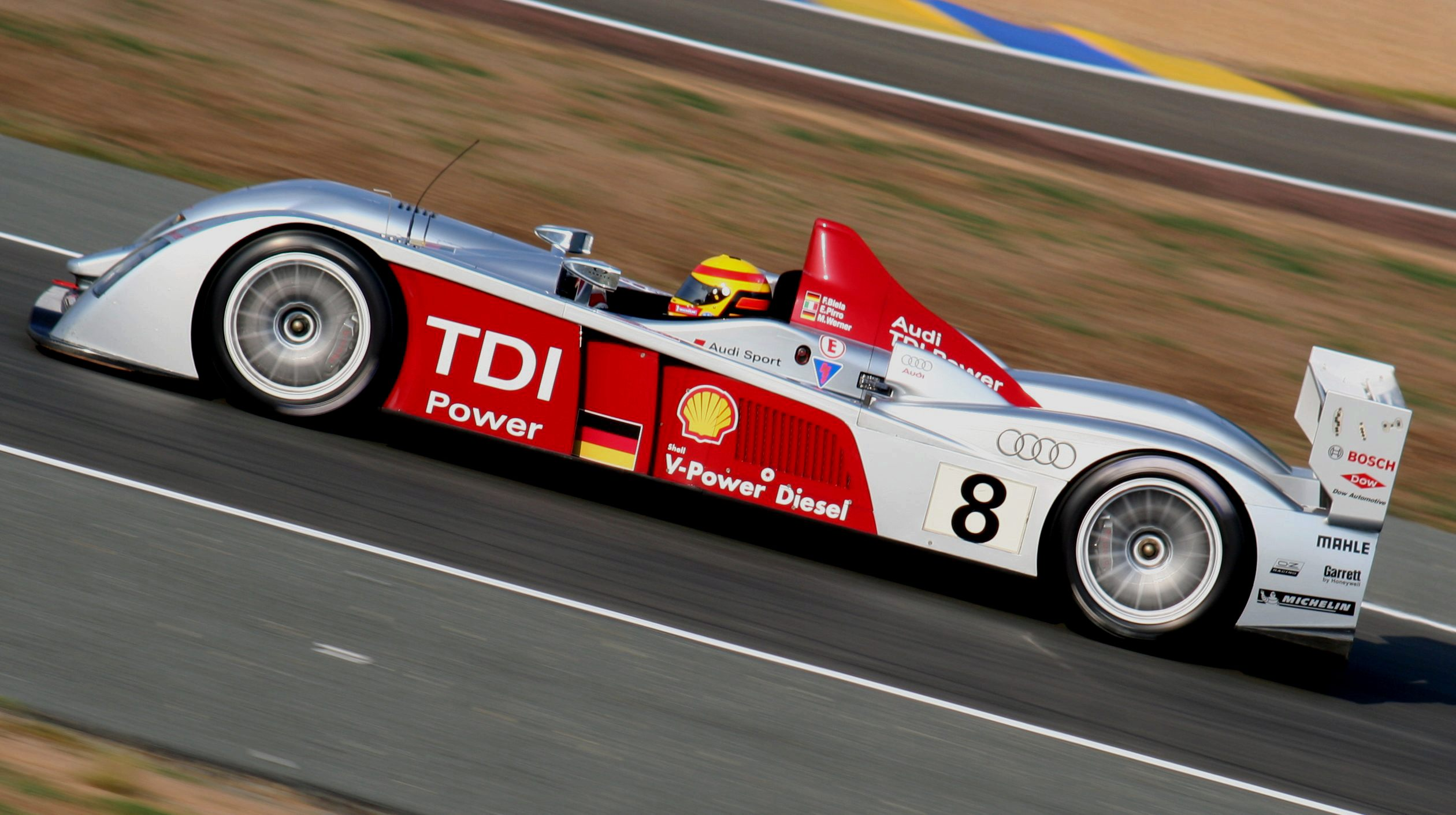 Audi R10 (driven by Frank Biela)